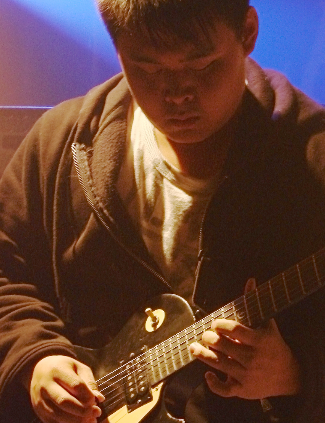 Order of Ennead en concert à la Locomotive, à Paris, le 10/01/09: John.